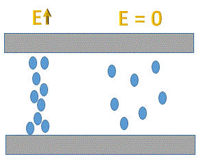 סכימה של התנהגות חליקים בנוזל אלקטרו-ראולוגי תחת מתח חשמלי